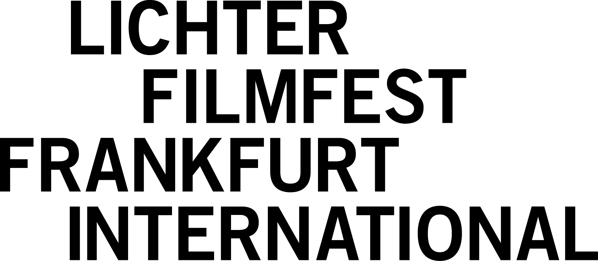 Logo Lichter Filmfest